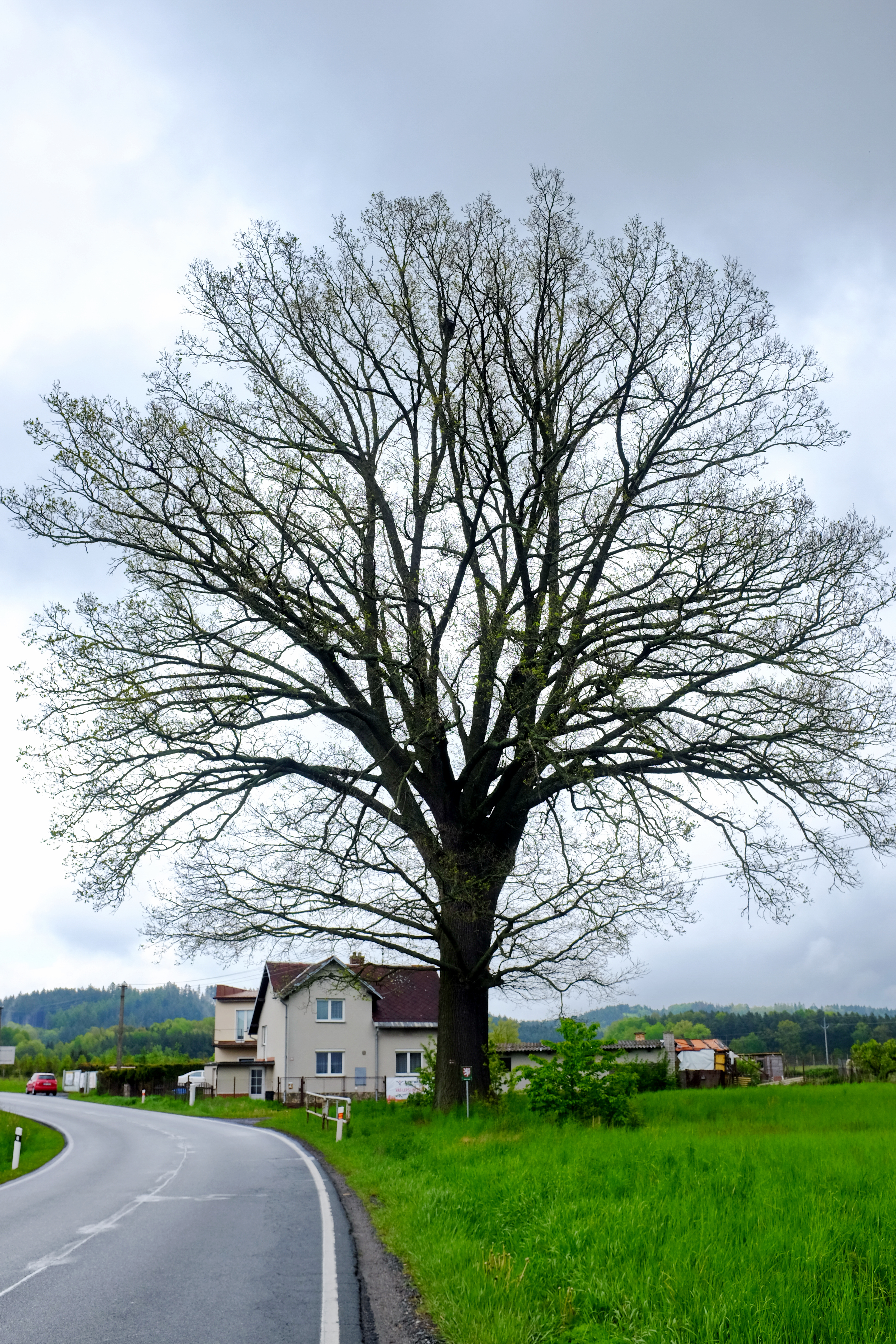 Památný strom - Chodovoplánský dub, Chodová Planá, okres Tachov